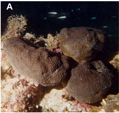 Spongia officinalis